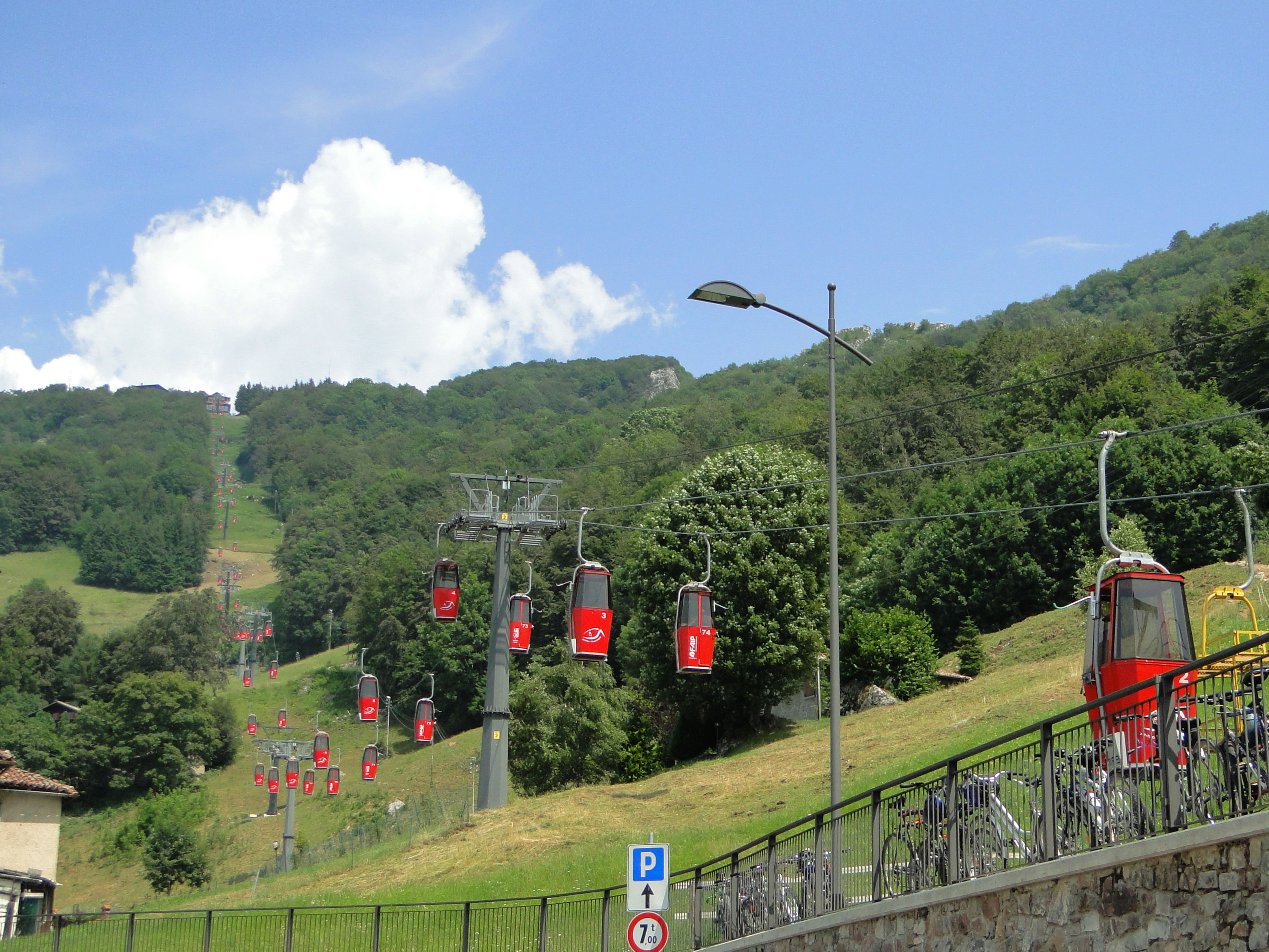 Aviatico, Bergamo, Italia